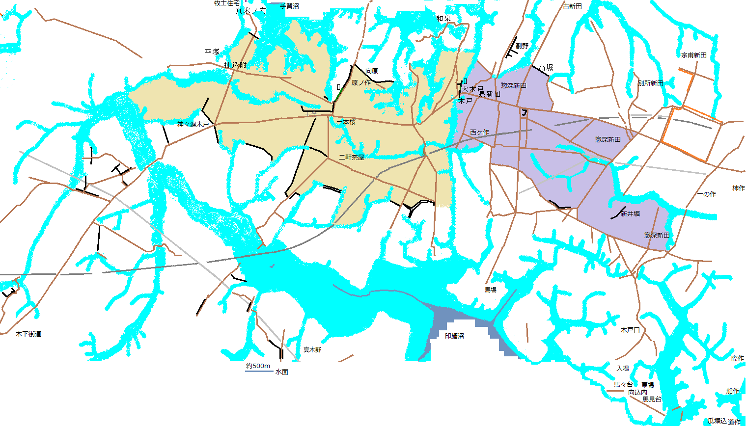 １００年前の地図を基に目分量で作成した小金牧印西牧の地図